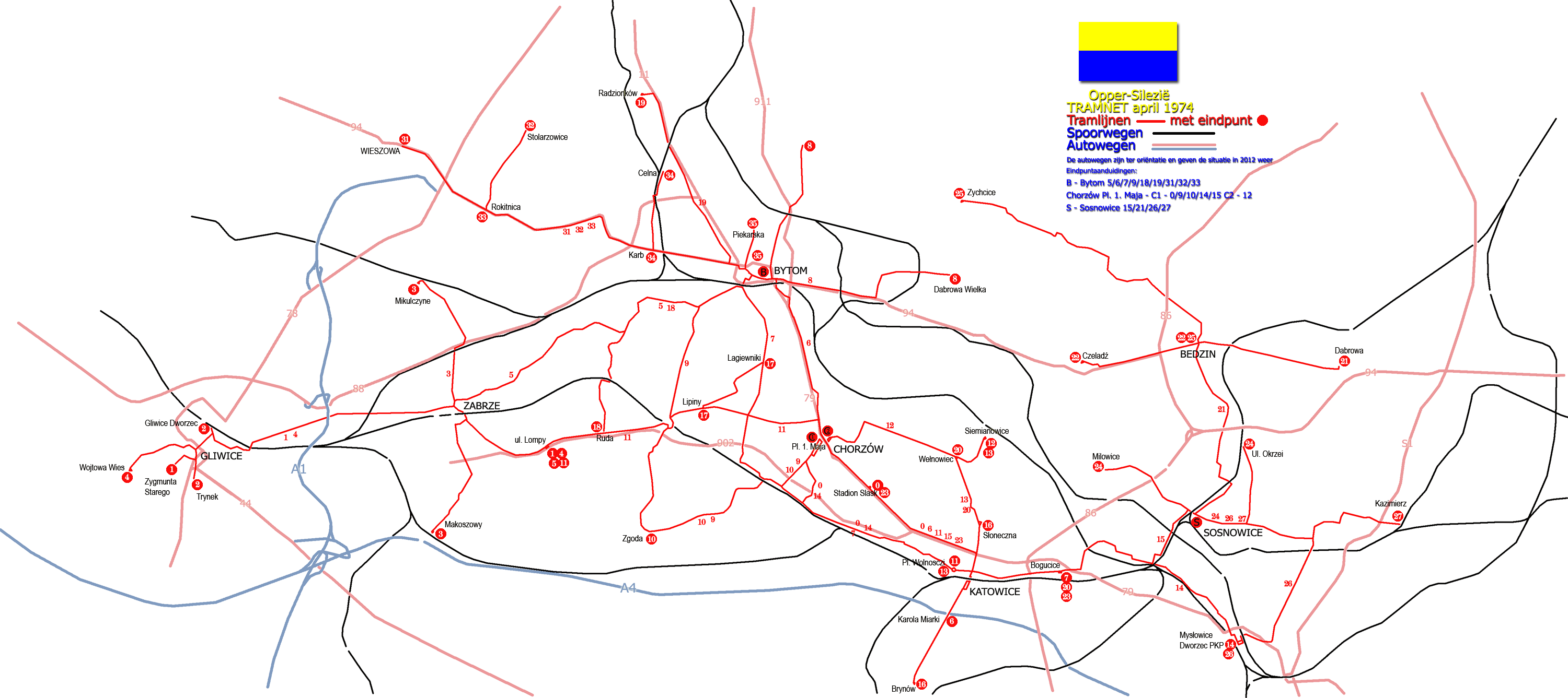 Tramnet Opper-Silezie in 1974